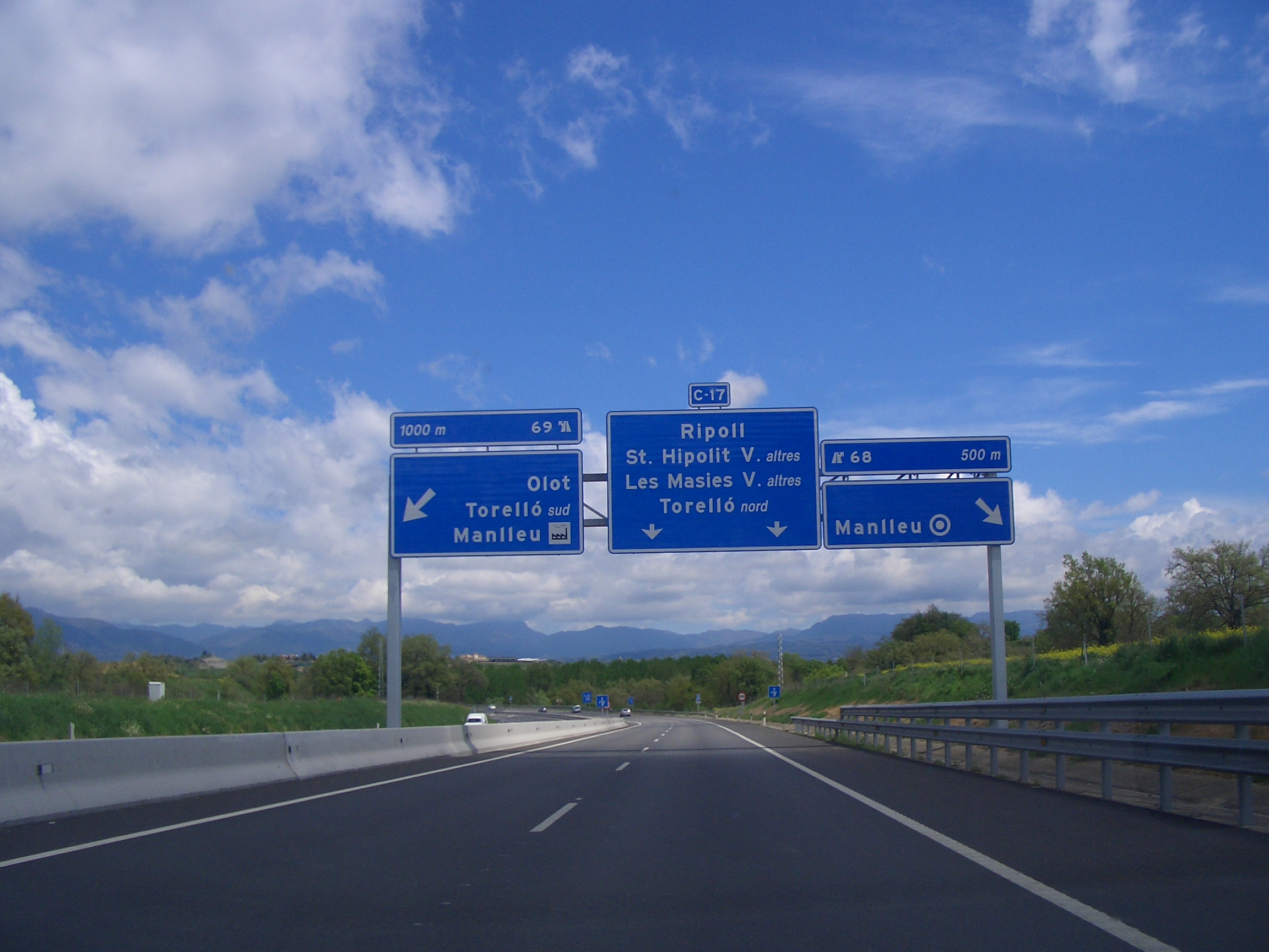 C-17 a Manlleu, Osona